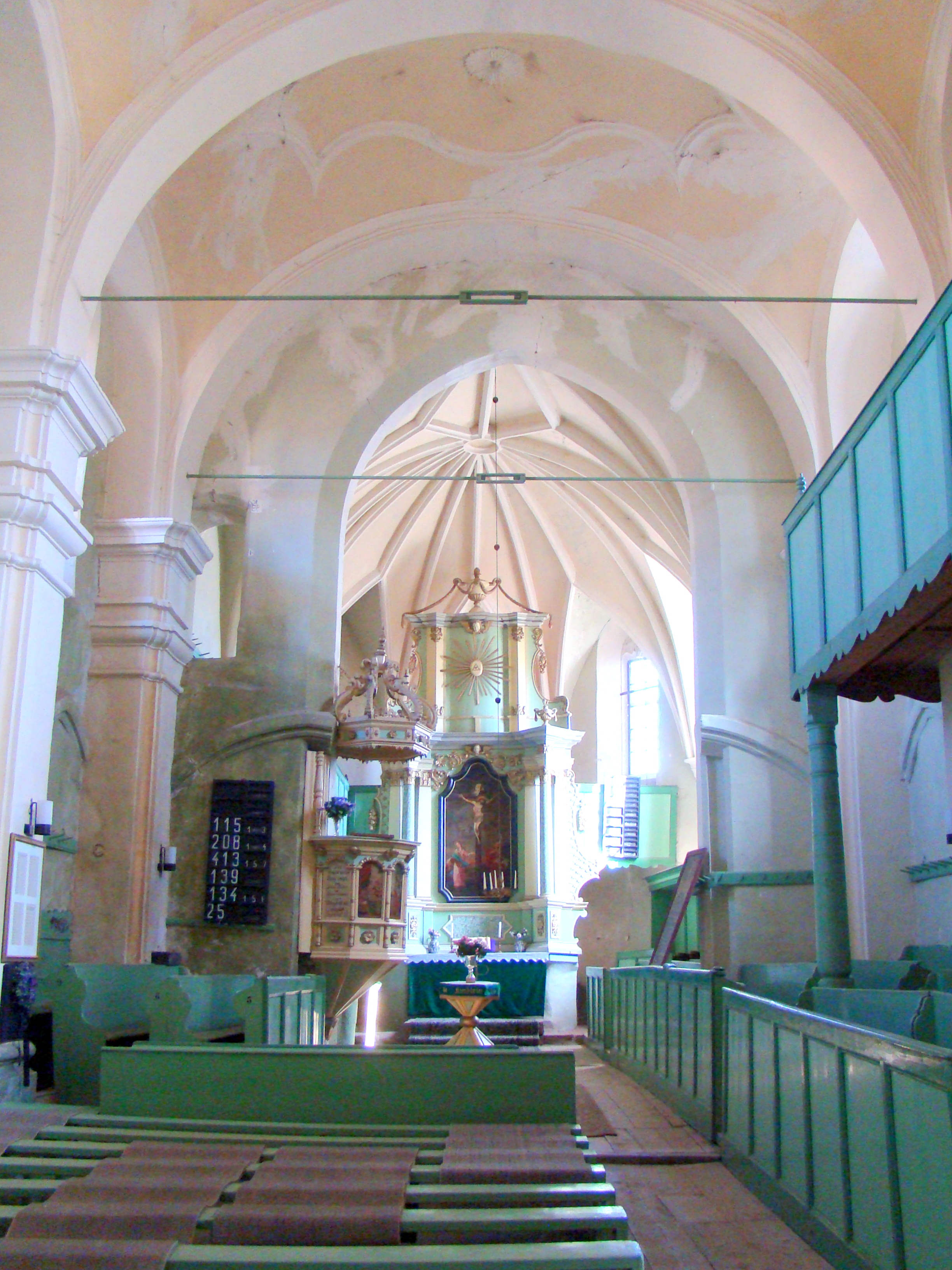 Biserica evanghelică fortificată, sat Șoarș; comuna Șoarș 282 sec. XV - XVI, 1806